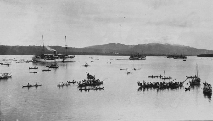 Foto. Baai met passagiersschepen en prauwen, Molukken